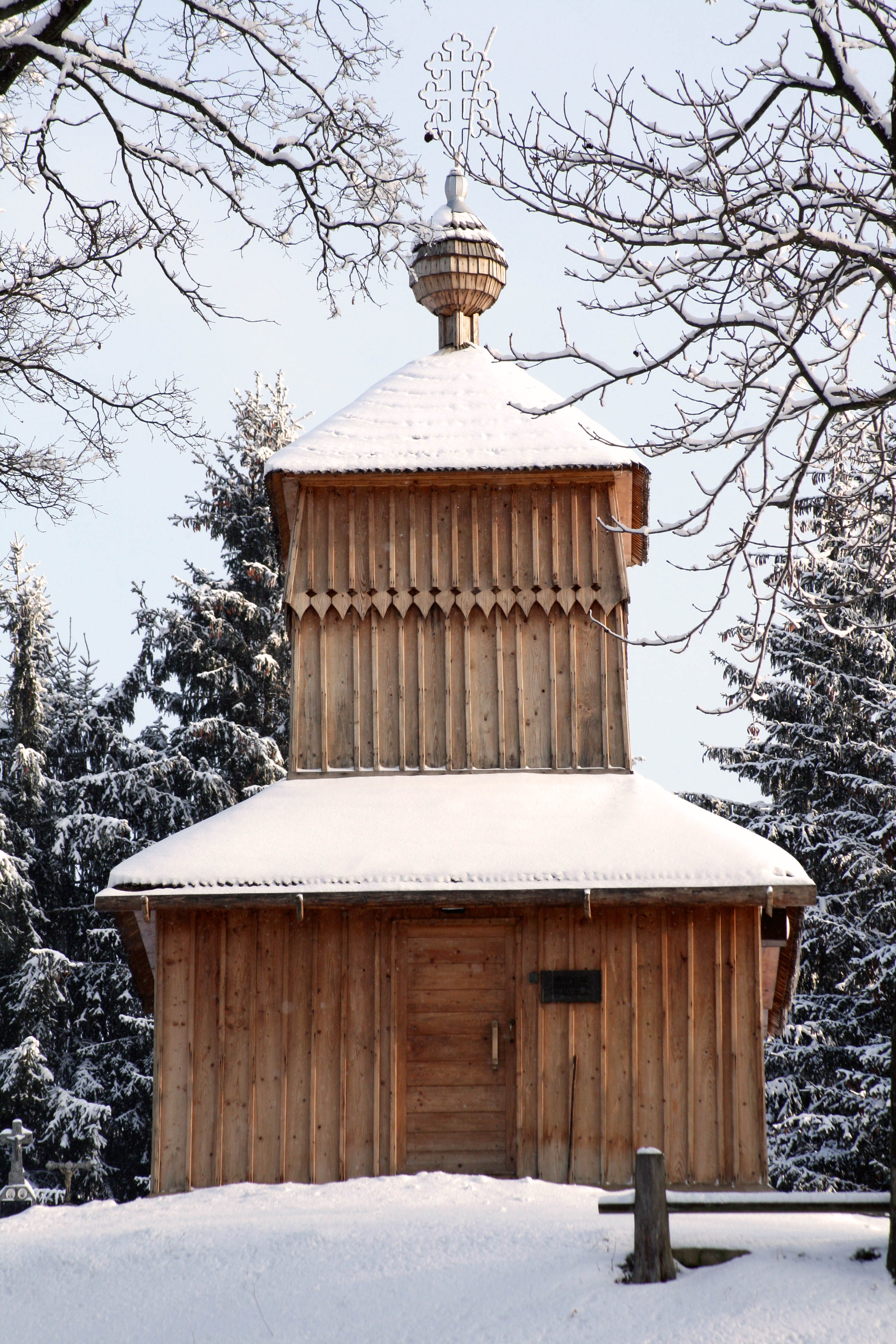 Chrám Ochrany Presvätej Bohorodičky v Korejovciach (okr. Svidník). Cerkva z roku 1764 patrí do súboru národných kultúrnych pamiatok